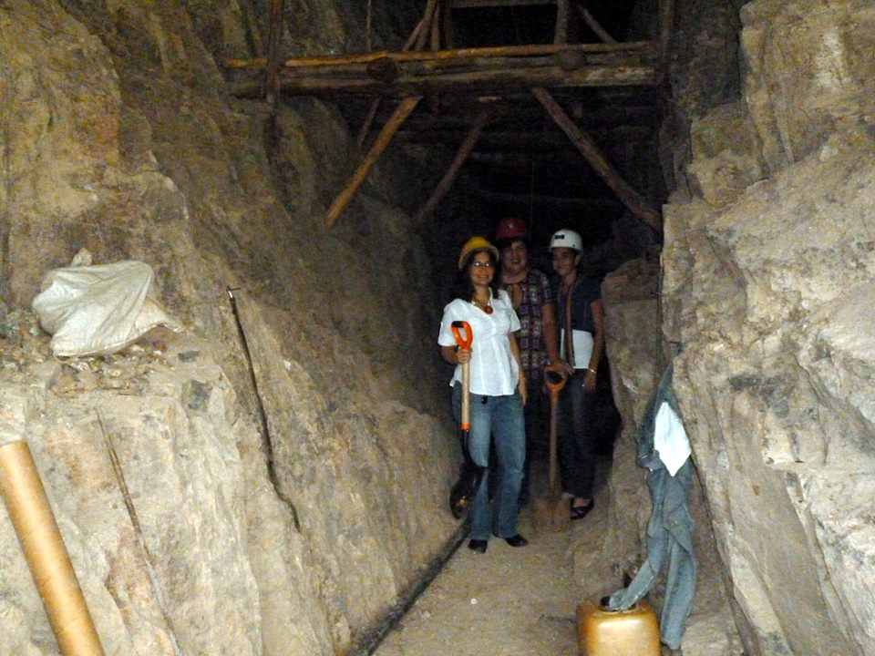 Movimiento Renovador Sandinista en Santa Rosa del Peñón, León, Nicaragua